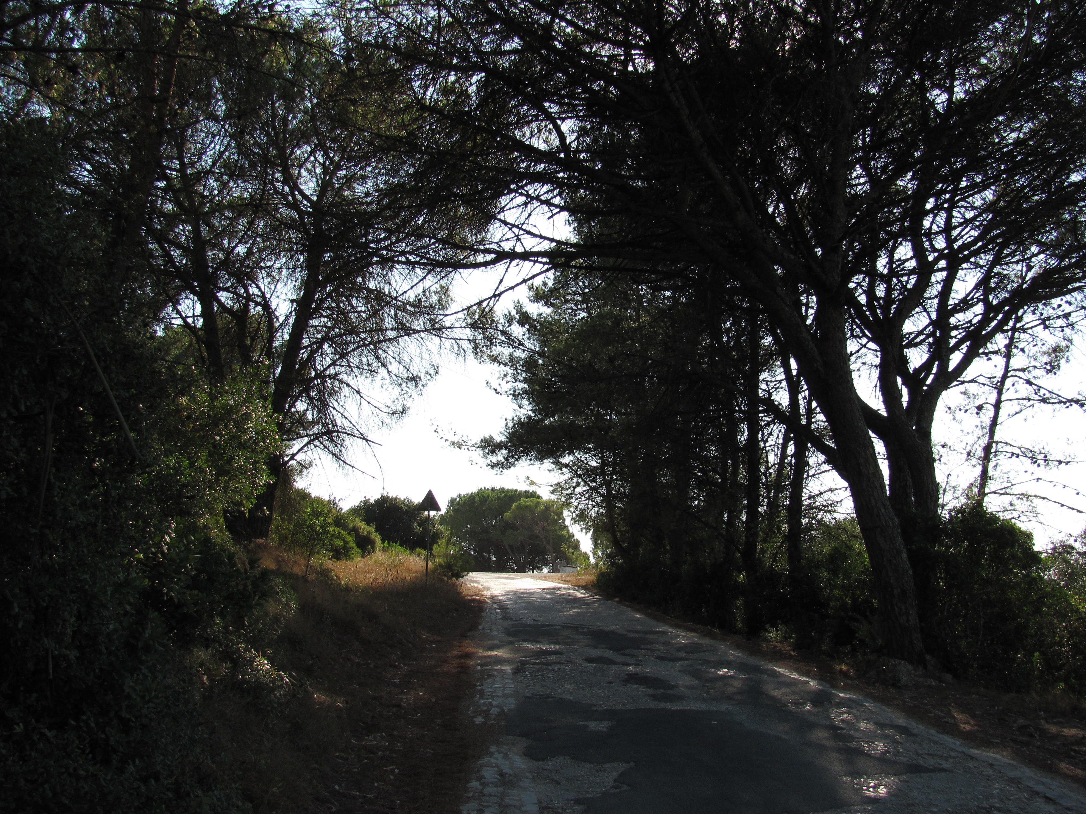 Photographie de la piste goudronnée qui mène de la freguesia de Cortes au massif de la Dame du Mont.